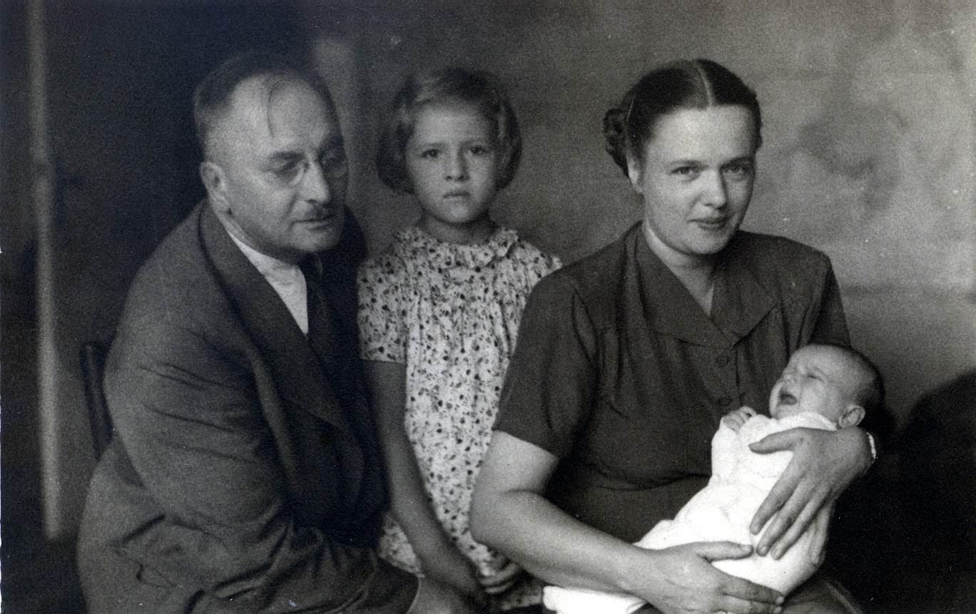 Сергей Семёнович Маслов (1 ноября 1887—1945?) эсер, организатор и теоретик кооперации, публицист, член Всероссийского учредительного собрания, управляющий военным отделом Верховного управления Северной области в Архангельске со 2 августа по 20 сентября 1918, лидер эмигрантской «Крестьянской России — Трудовой крестьянской партии» с женой Ией, урождённой Андрукович и дочерьми Татьяной и Наталией..